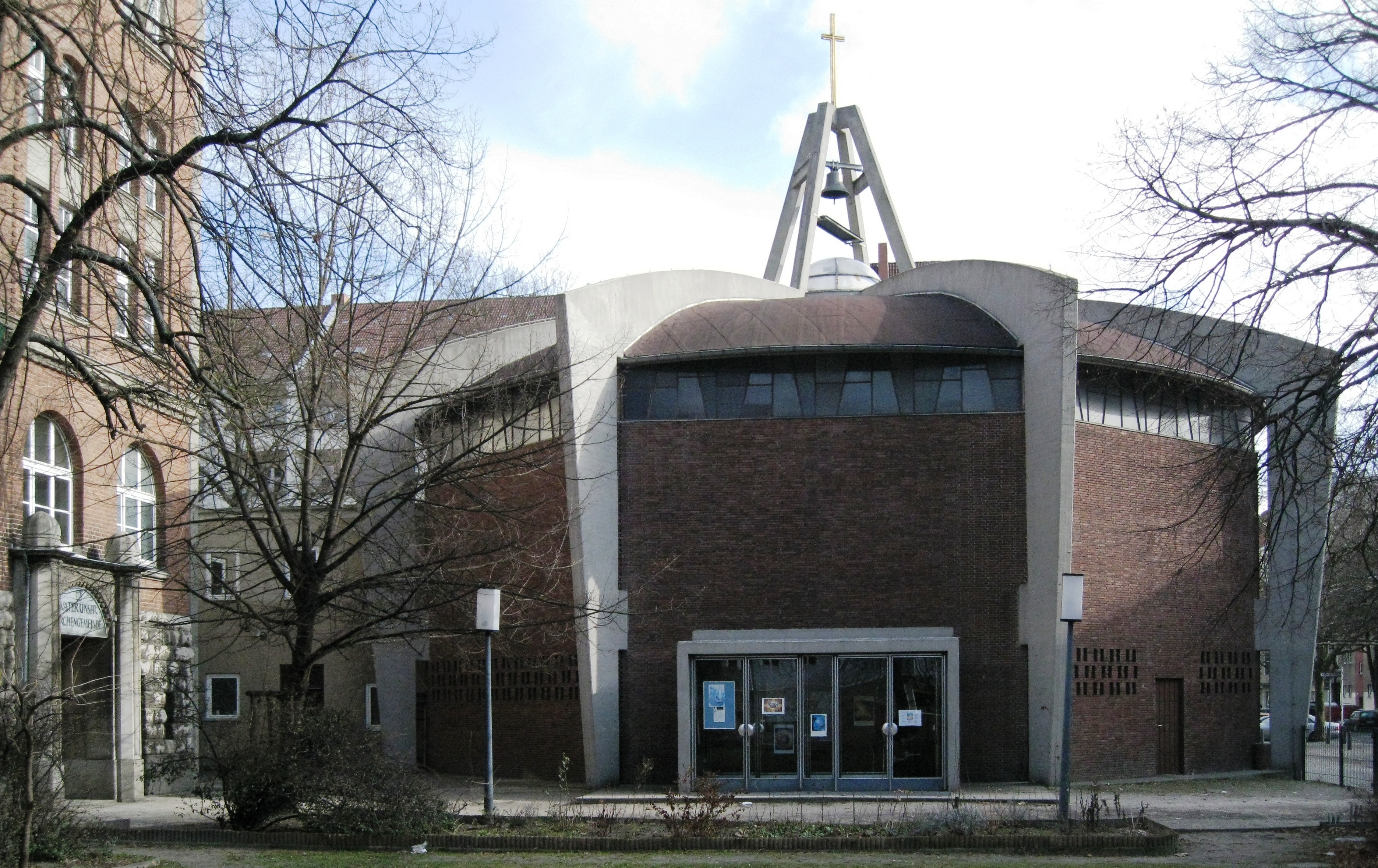 Vaterunser-Kirche, links der Seitenflügel zum Gemeindehaus